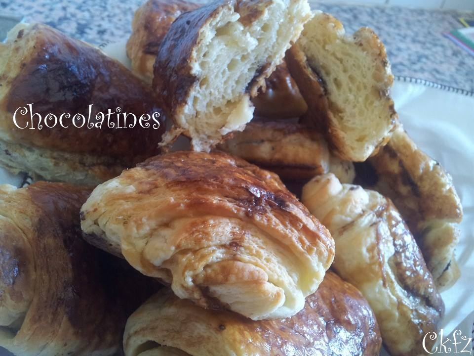 Chocolatines fait maison This is an image of food from Morocco